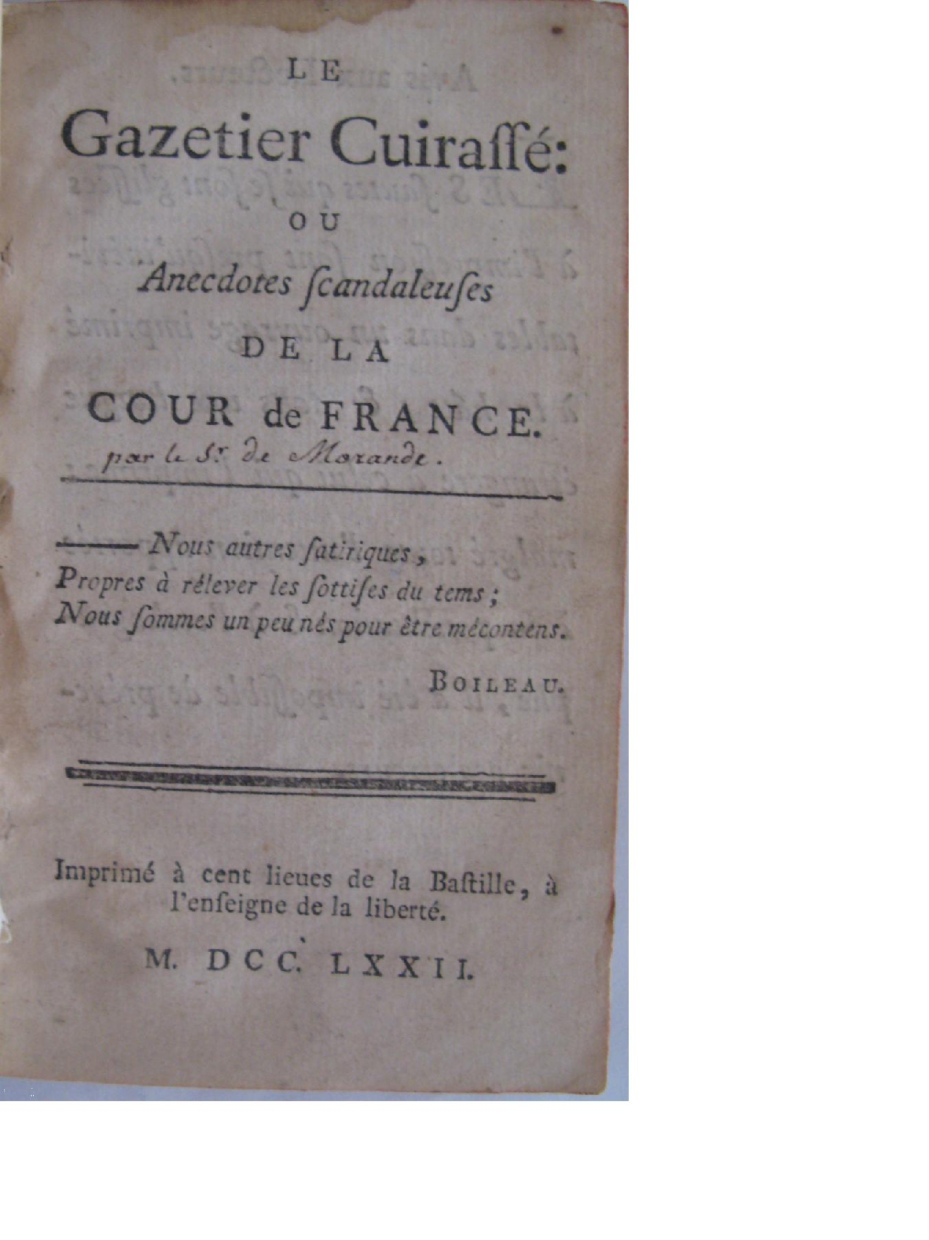 Page de titre du Gazetier Cuirassé de Charles Théveneau de Morande.